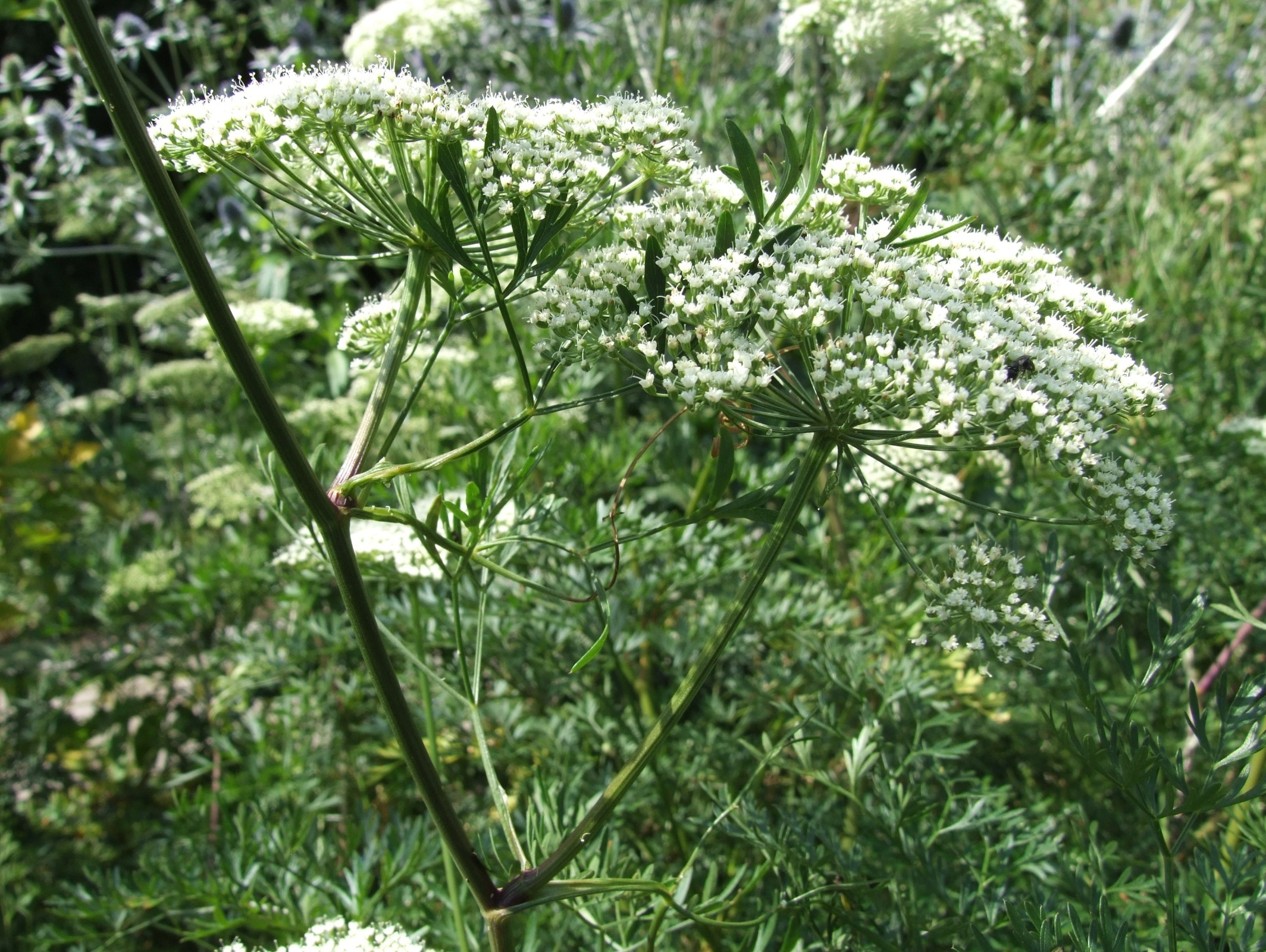 Silaum silaus (pl. koniopłoch łąkowy)